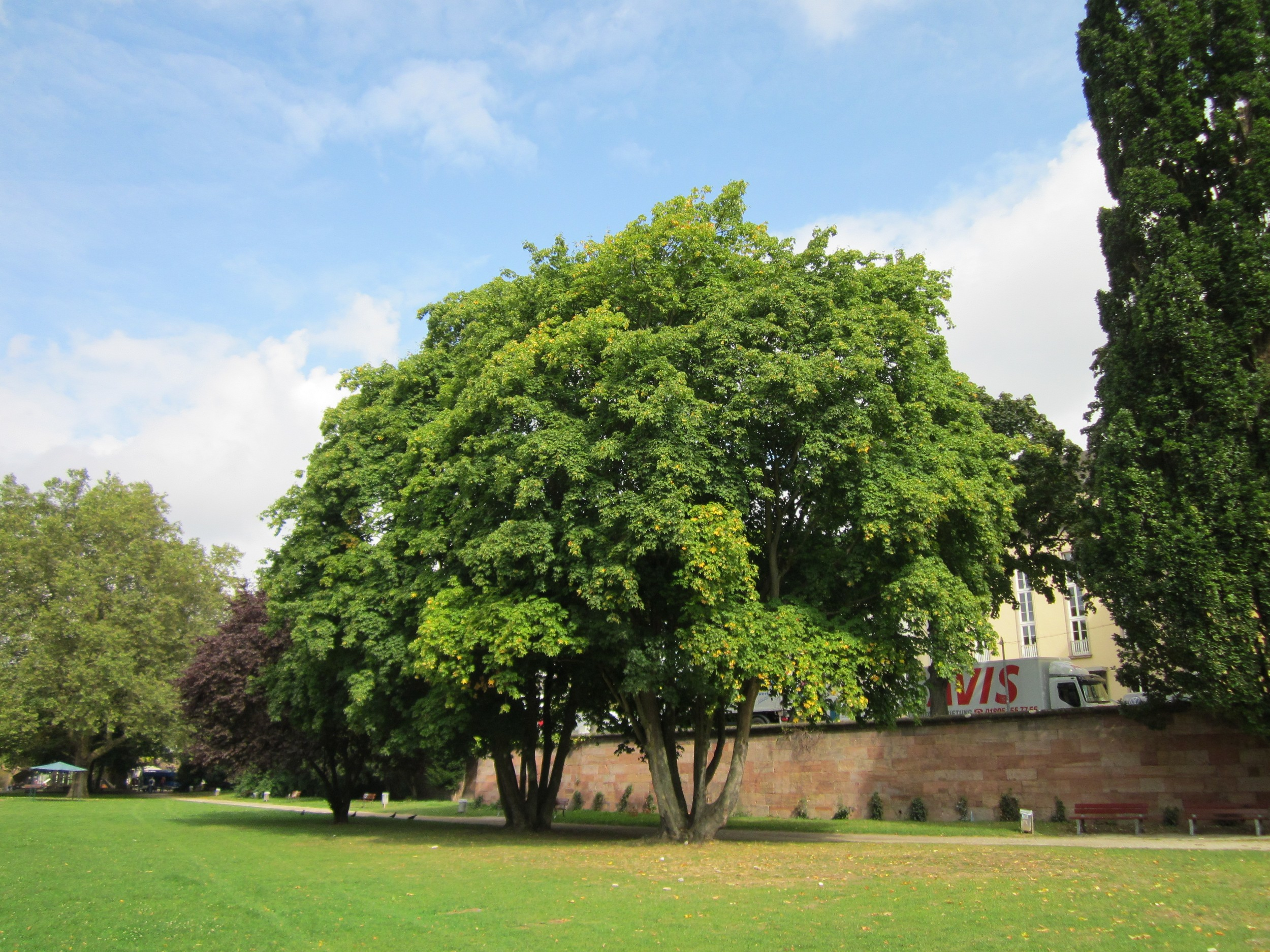 Spitzahorn (Acer platanoides) an der Saar vor dem Staatstheater Saarbrücken